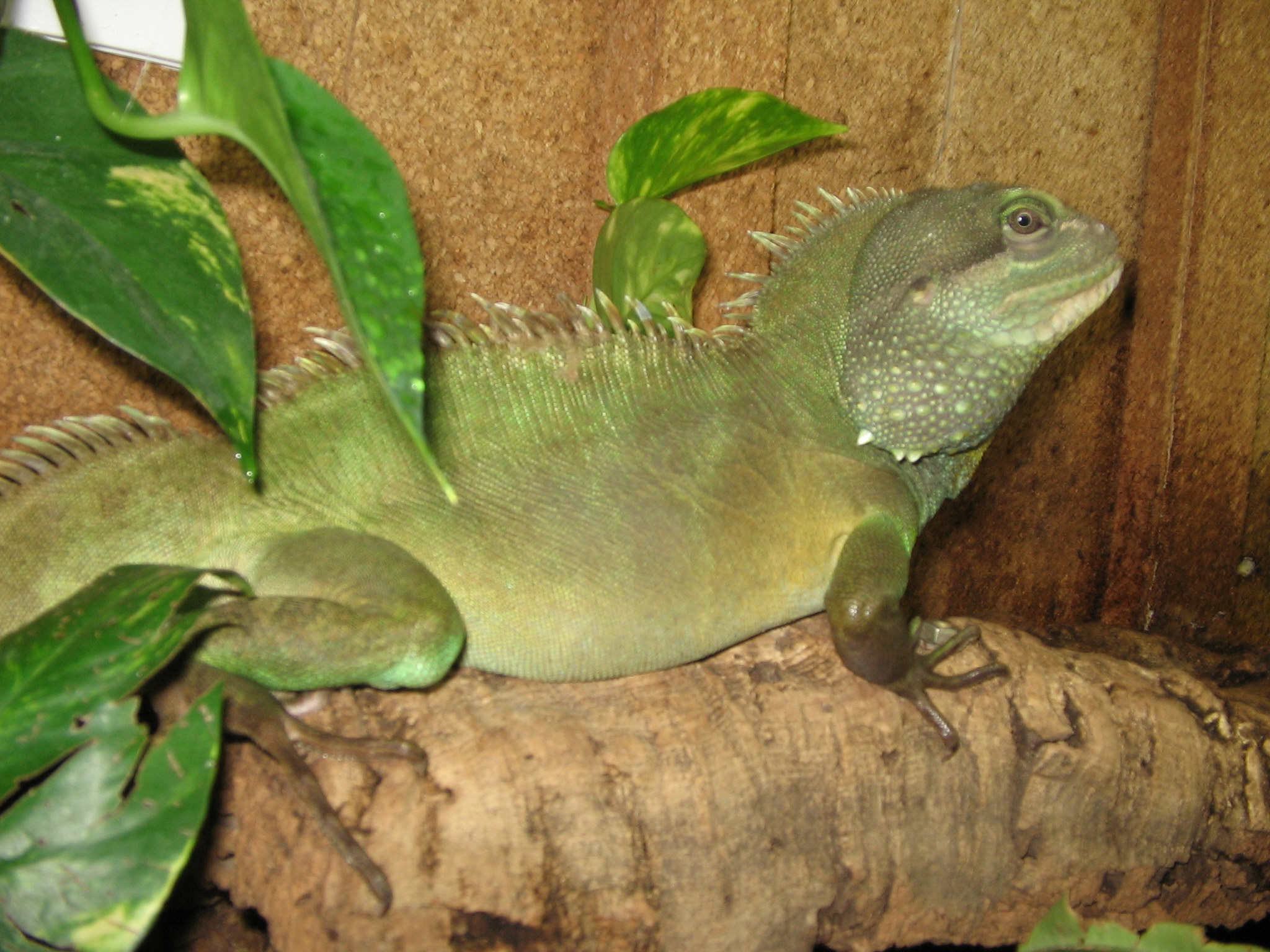 Männchen der Physignathus cocincinus